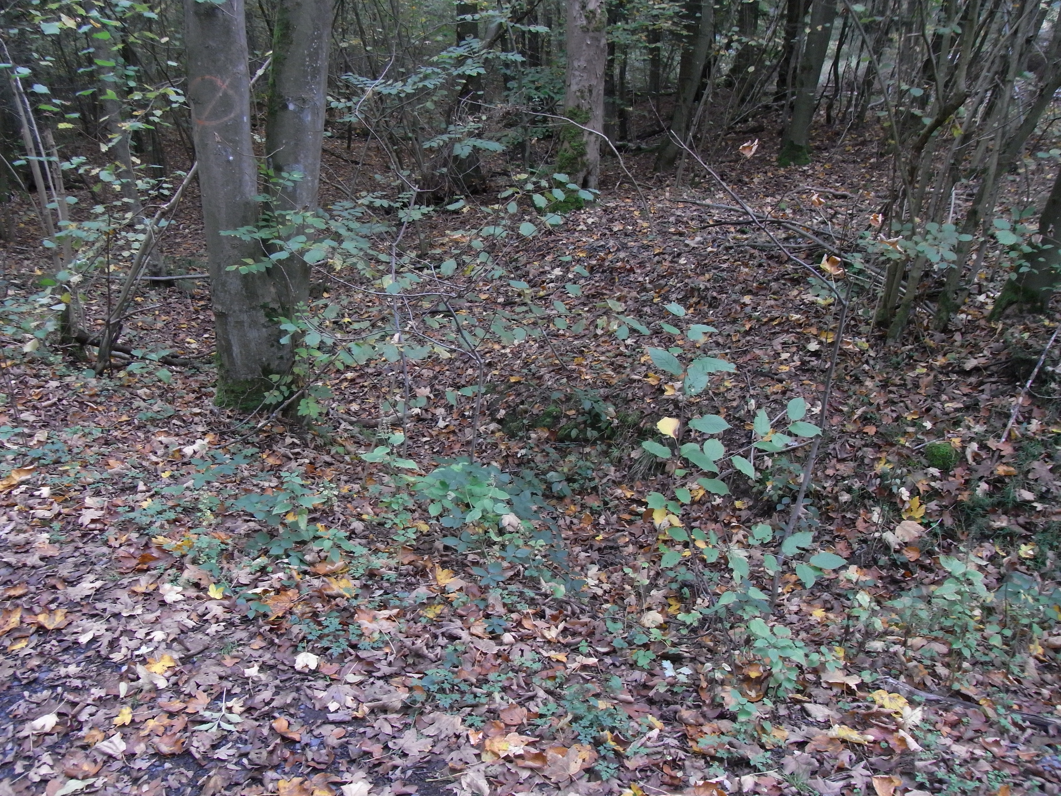 Der Aitzenbach-Nebenlauf unter einer Infotafel oberhalb der Panzerstraße